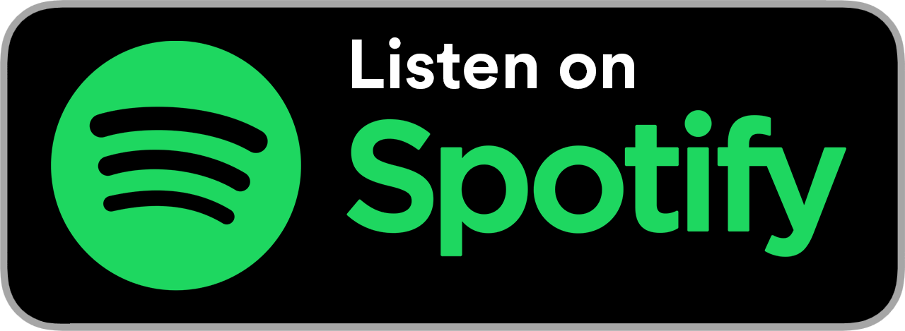 Spotify large badge for digital media.